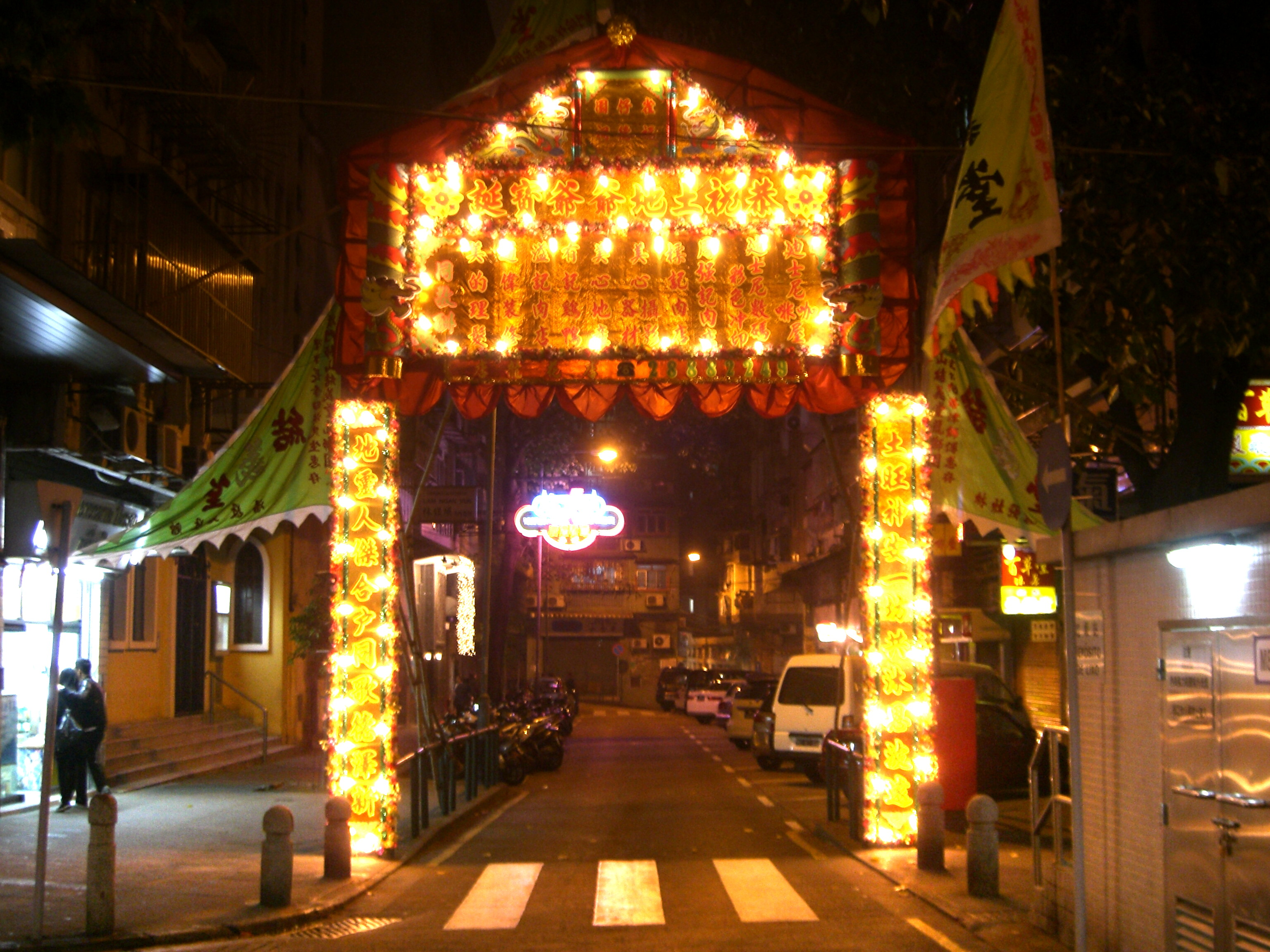 Rua de Henrique de Macedo